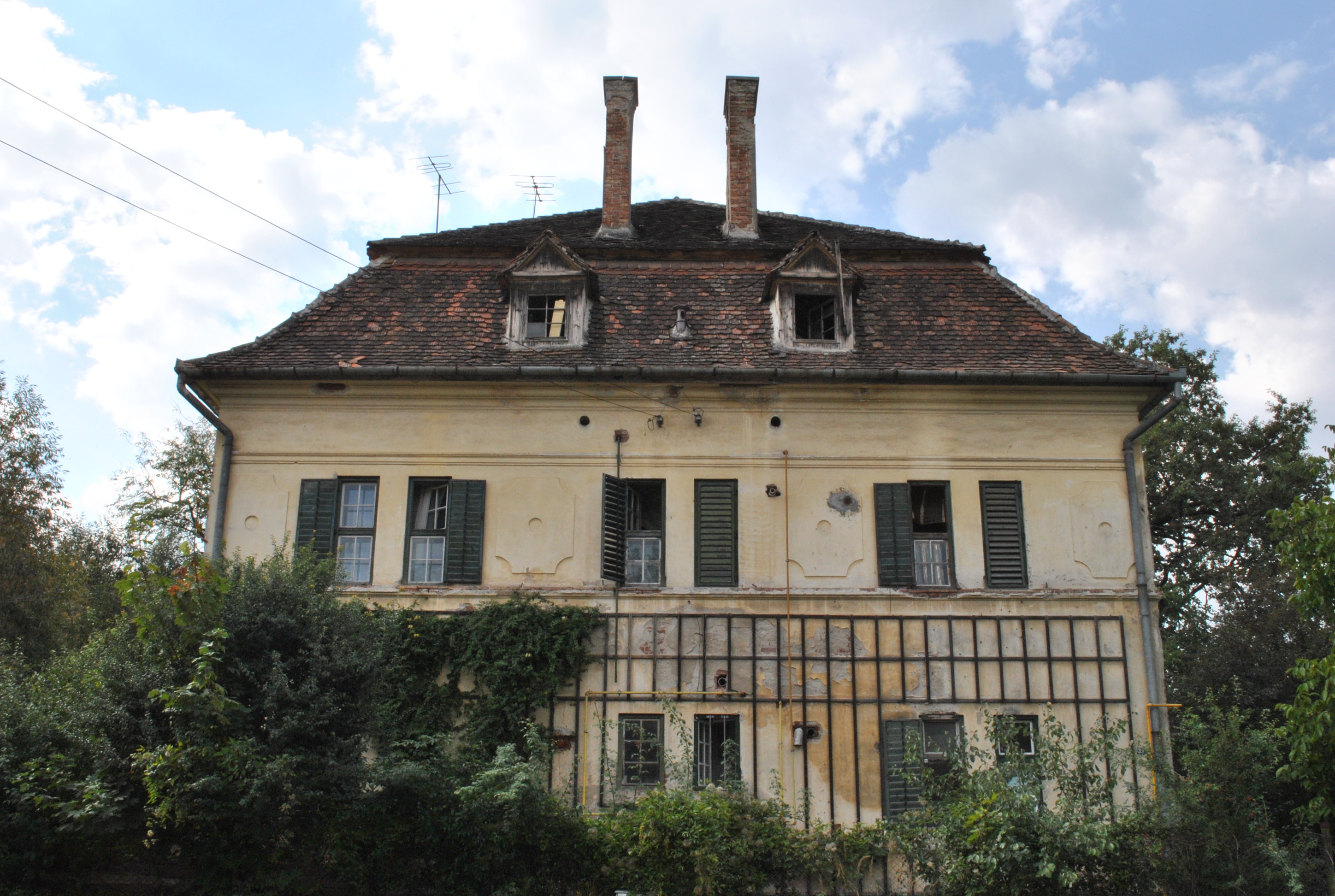 Casa "Anastasiu Boiu" sf. sec. XIX